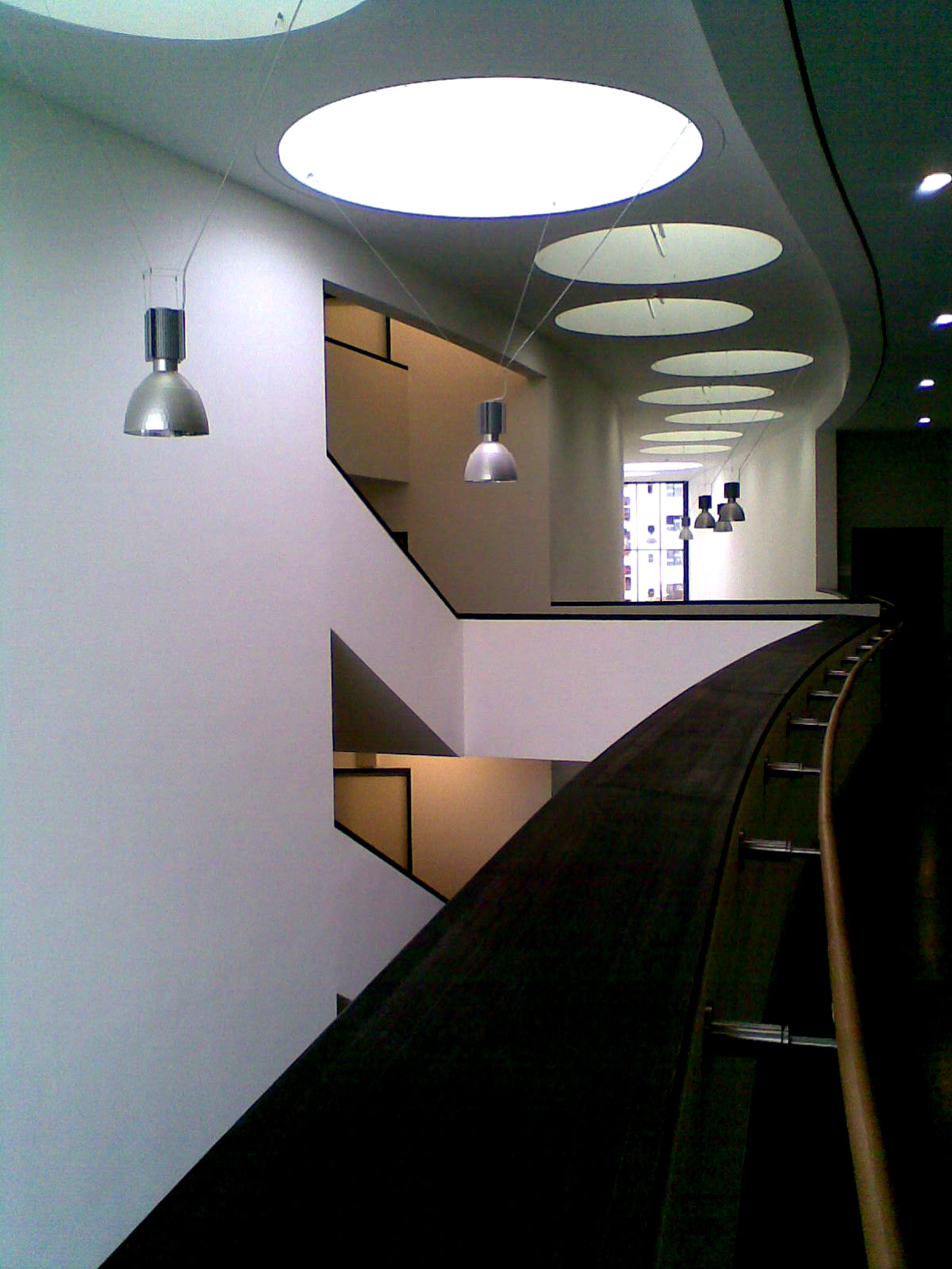 Die Staatliche Ballettschule Berlin entstand 1954 auf Anregung von Gret Palucca als Ausbildungsstätte für Ballettmitglieder. Heute werden an dieser Schule die Fachrichtungen Bühnentanz und Artistik gelehrt. Durch die Zusammenlegung mit der Artistenschule in den 1990er Jahren lautet der vollständige Name „Staatliche Ballettschule und Schule für Artistik“. In den Jahren 2009 bis 2012 erfolgte ein Umbau der vorhandenen Gebäude nach einem Entwirf des Architektenbüros German, Mark und Partner. Dabei wurde eine architektonische Lösung gefunden, die den Schulteil durch einen Mittelgang mit den Ballettsälen der praktischen Ausbildung verbindet.